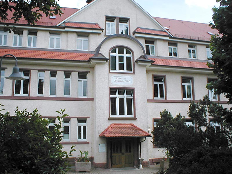 Eines der ältesten Gebäude (erbaut 1914/15) der Johannesanstalten im Schwarzacher Hof, Schwarzach (Odenwald)